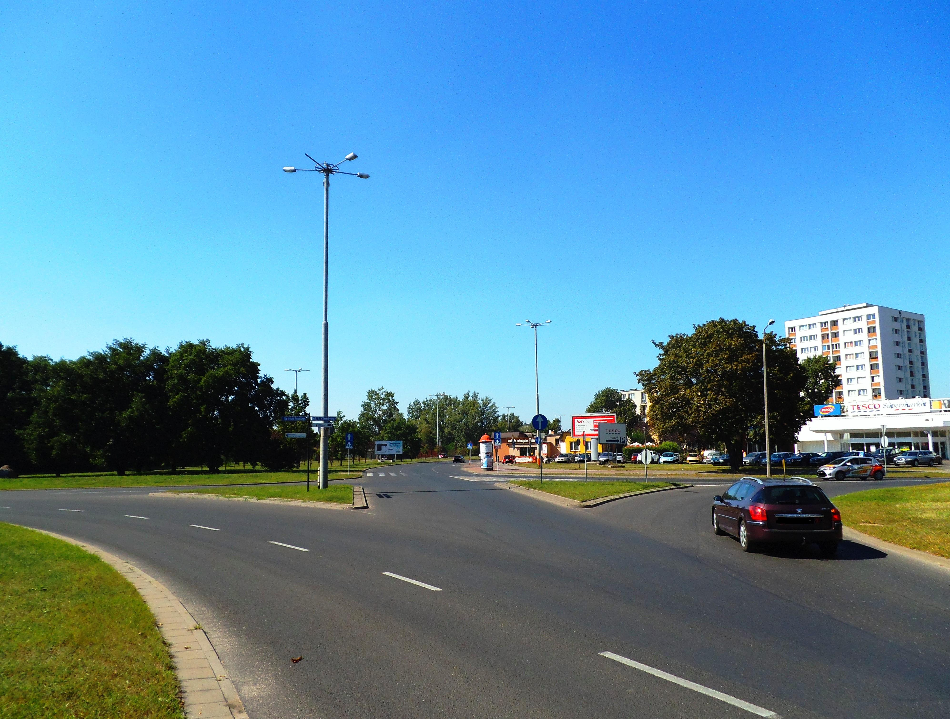 Plac II Pokoju Toruńskiego w Toruniu